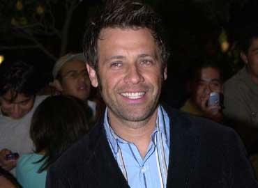 actor Capadocia